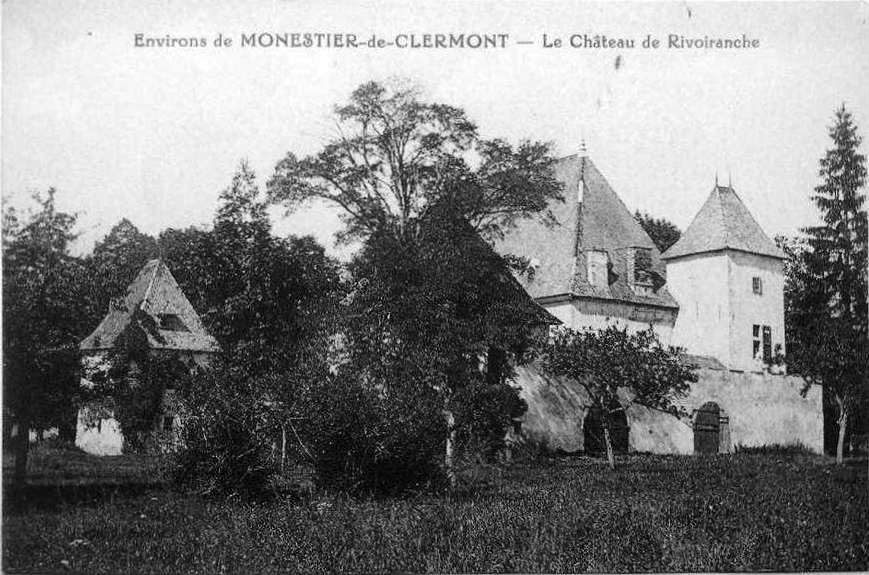 Château de Rivoiranche sur une carte postale du début du XX siècle, Saint-Paul-lès-Monestier, Isère, Rhône-Alpes, France.